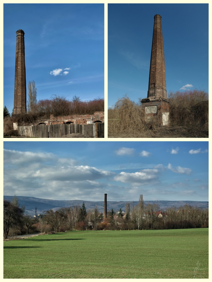 Cihelna, Teplice-Hudcov.